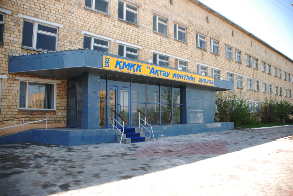 Коммунальное государственное казенное предприятие "Больница поселка Актау"